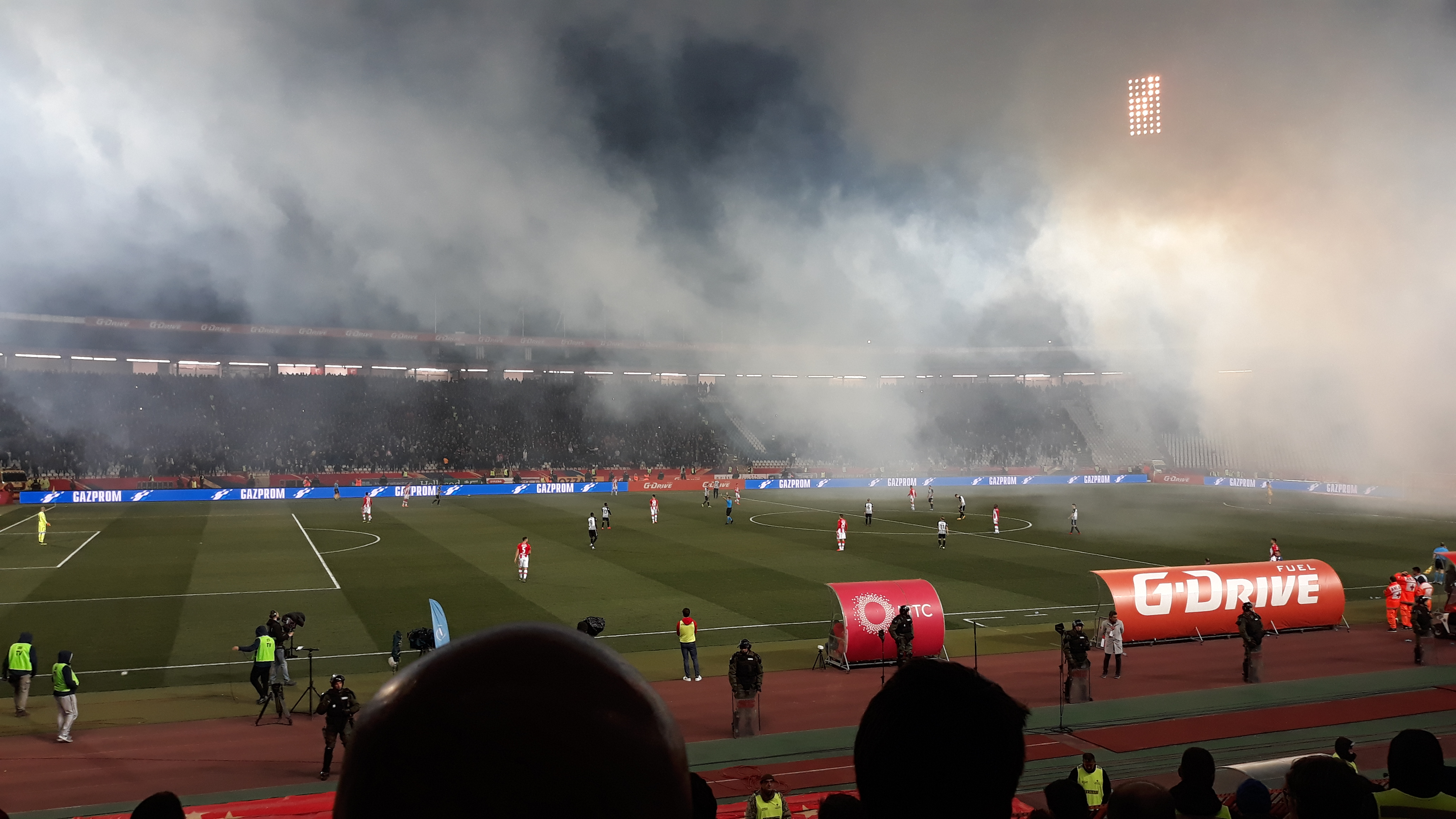 Марко Гобељић је на 162. вечитом дербију забележио свој 100. званични наступ у дресу Црвене звезде